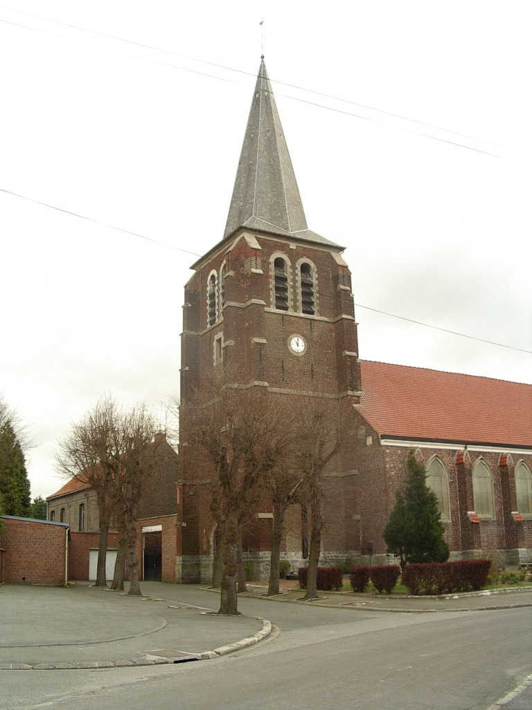 Eglise Saint Vaast Ostricourt